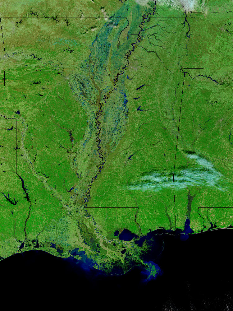 Unterer Abschnitt des Mississippi. Falschfarbenaufnahme: Grün stellt Vegetation dar, Wasser ist schwarz oder blau - blaues Wasser stellt besonderen Sedimenreichtum dar.